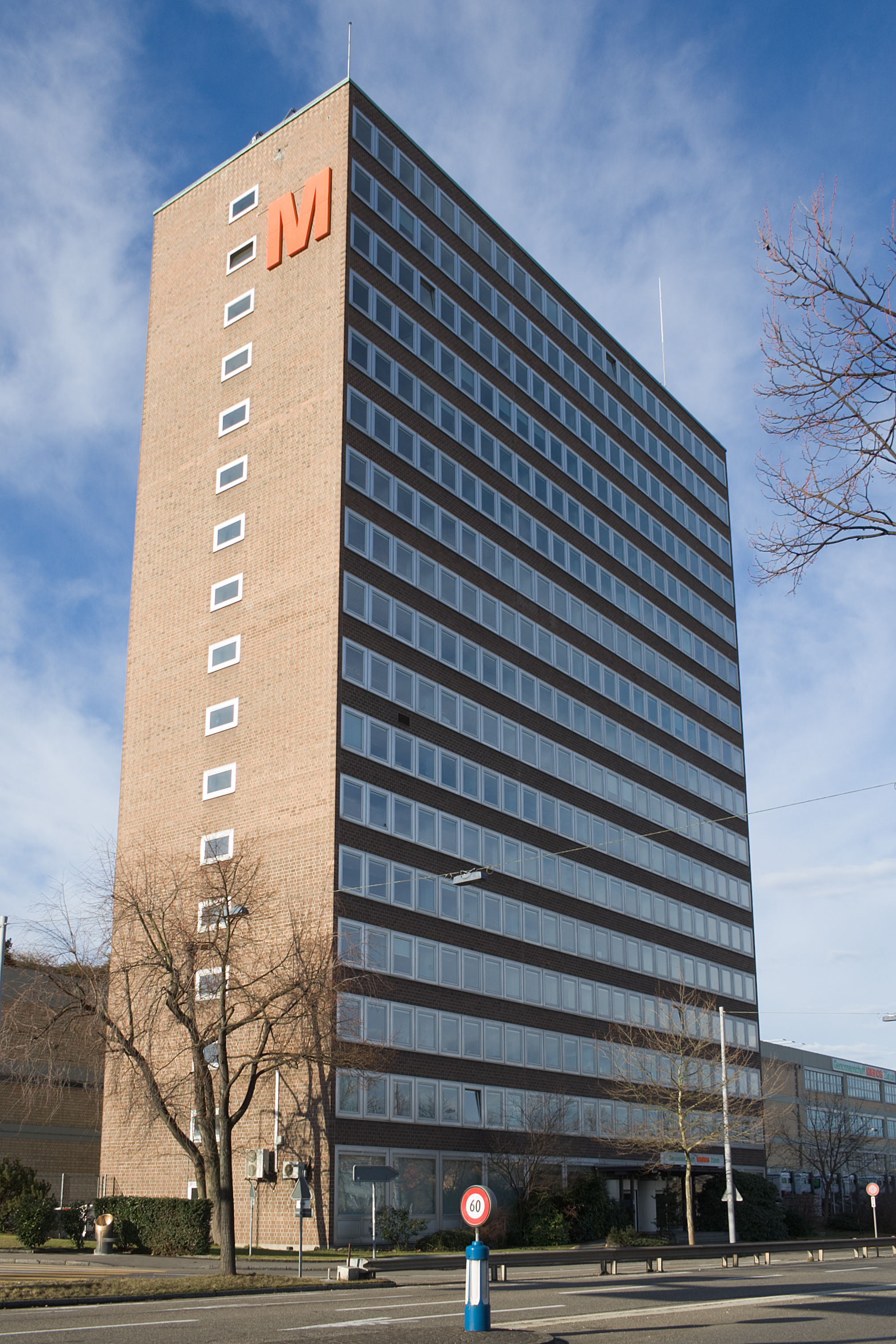 Hochhaus Migros Herdern in Zürich, Schweiz